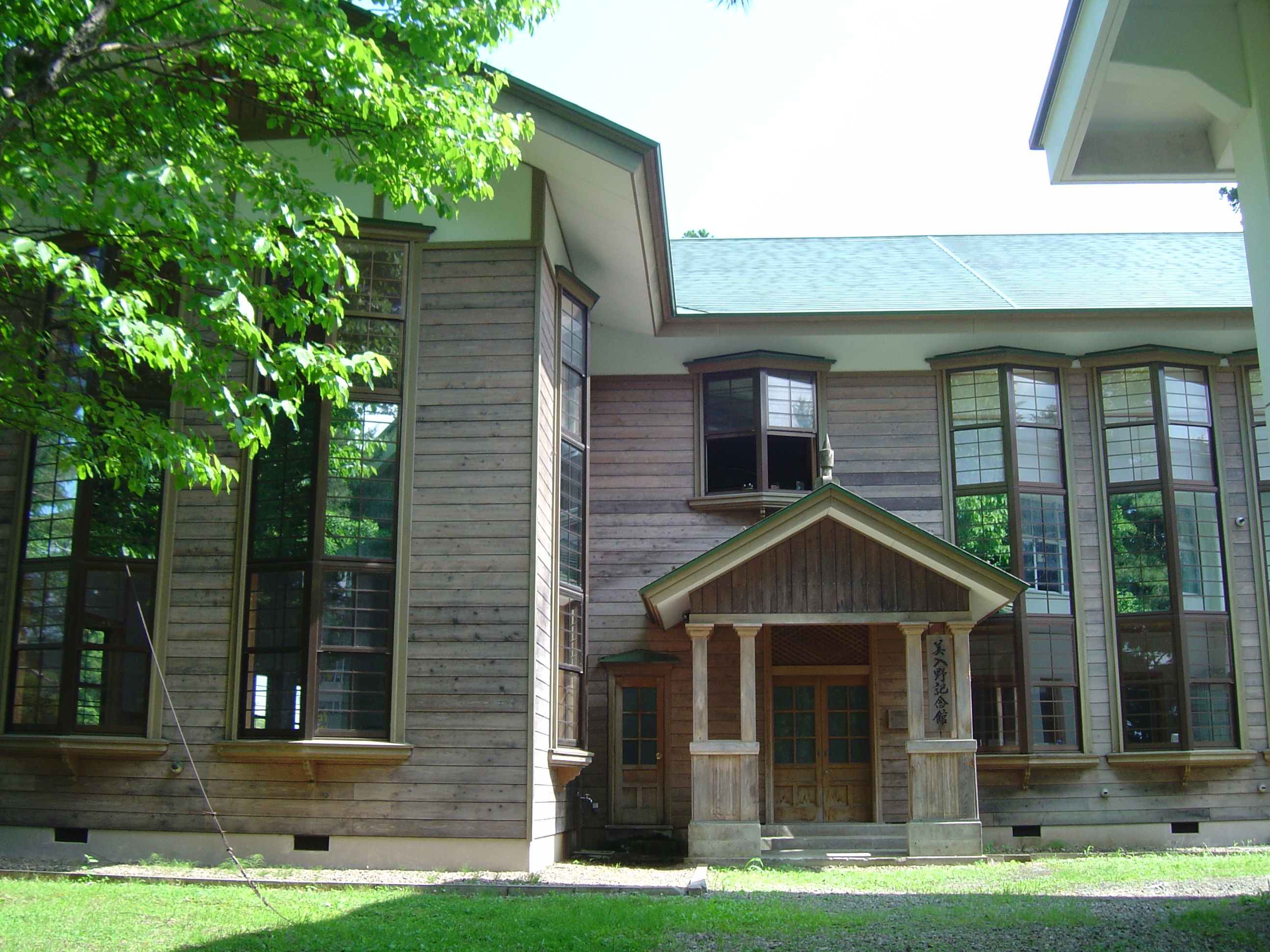 美入野祭にて